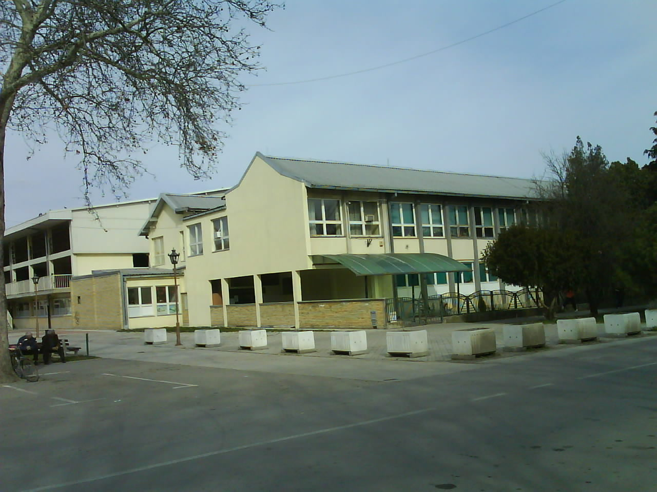 Osnovna škola i sportska dvorana u Bačkom Jarku